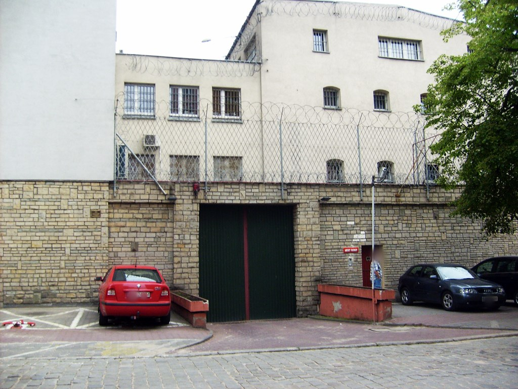 Poznań, Młyńska 1, wejście do aresztu